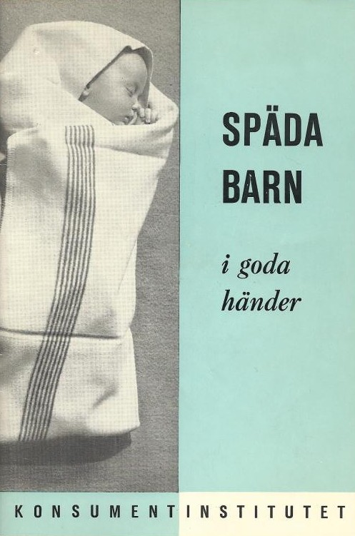 Svenska Konsumentinstitutets handbok “Späda barn i goda händer” (utkom under hela 1970-talet).